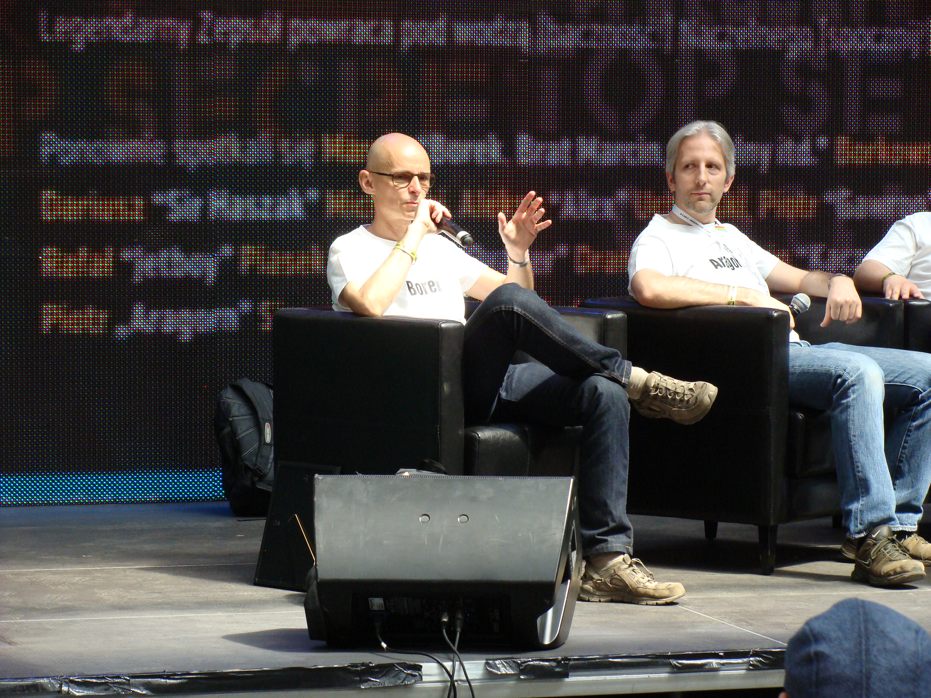 Marcin Borkowski podczas spotkania z redakcją "Top Secretu" na Pixel Heaven, 27 maja 2017